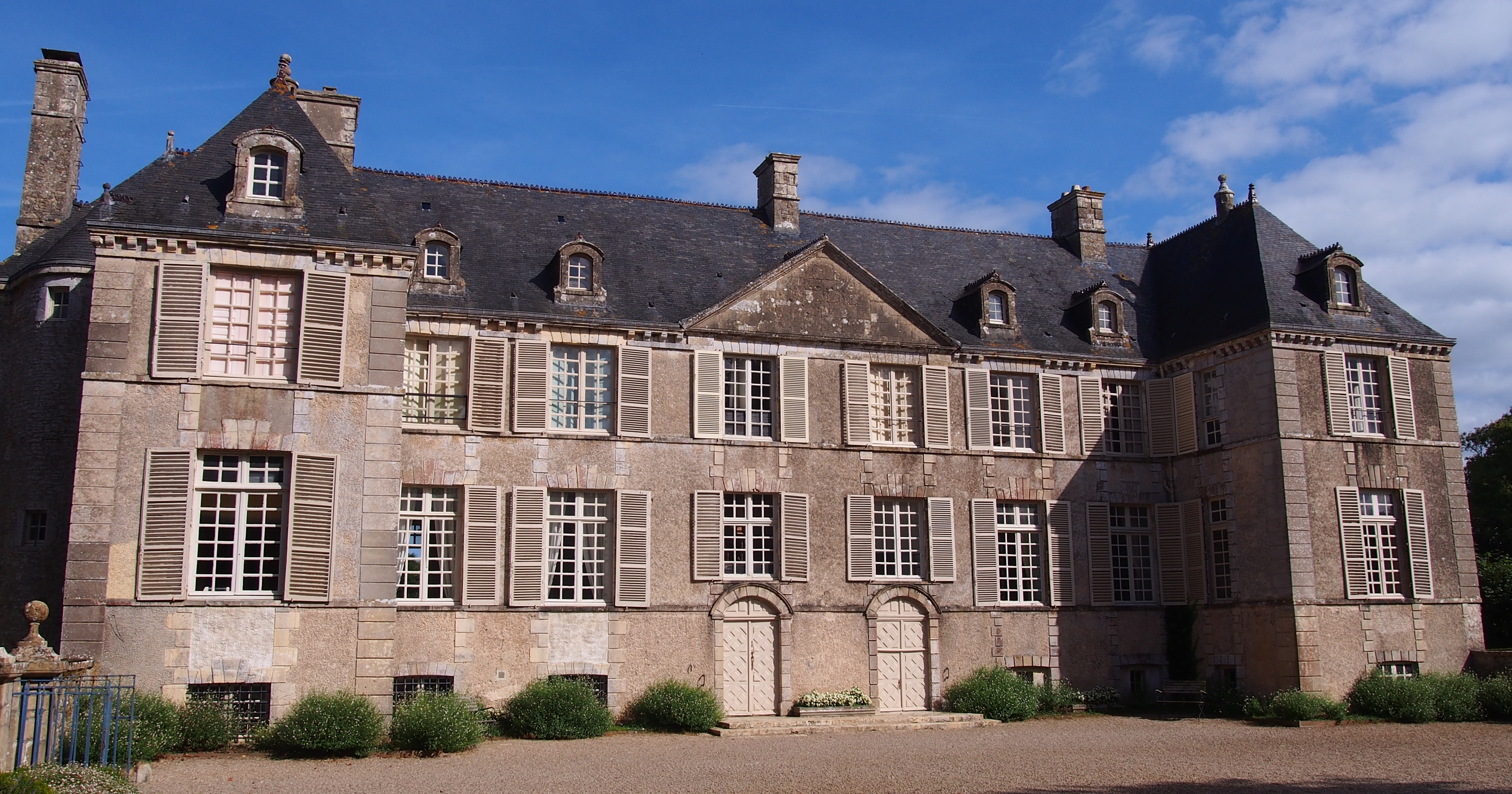 Fontenay-sur-Mer (Normandie, France). Le château de Courcy.